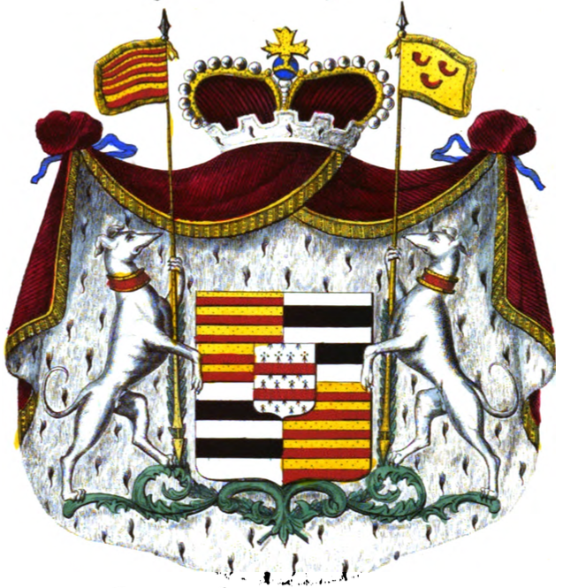 Armoiries de la Maison de Looz-Corswarem